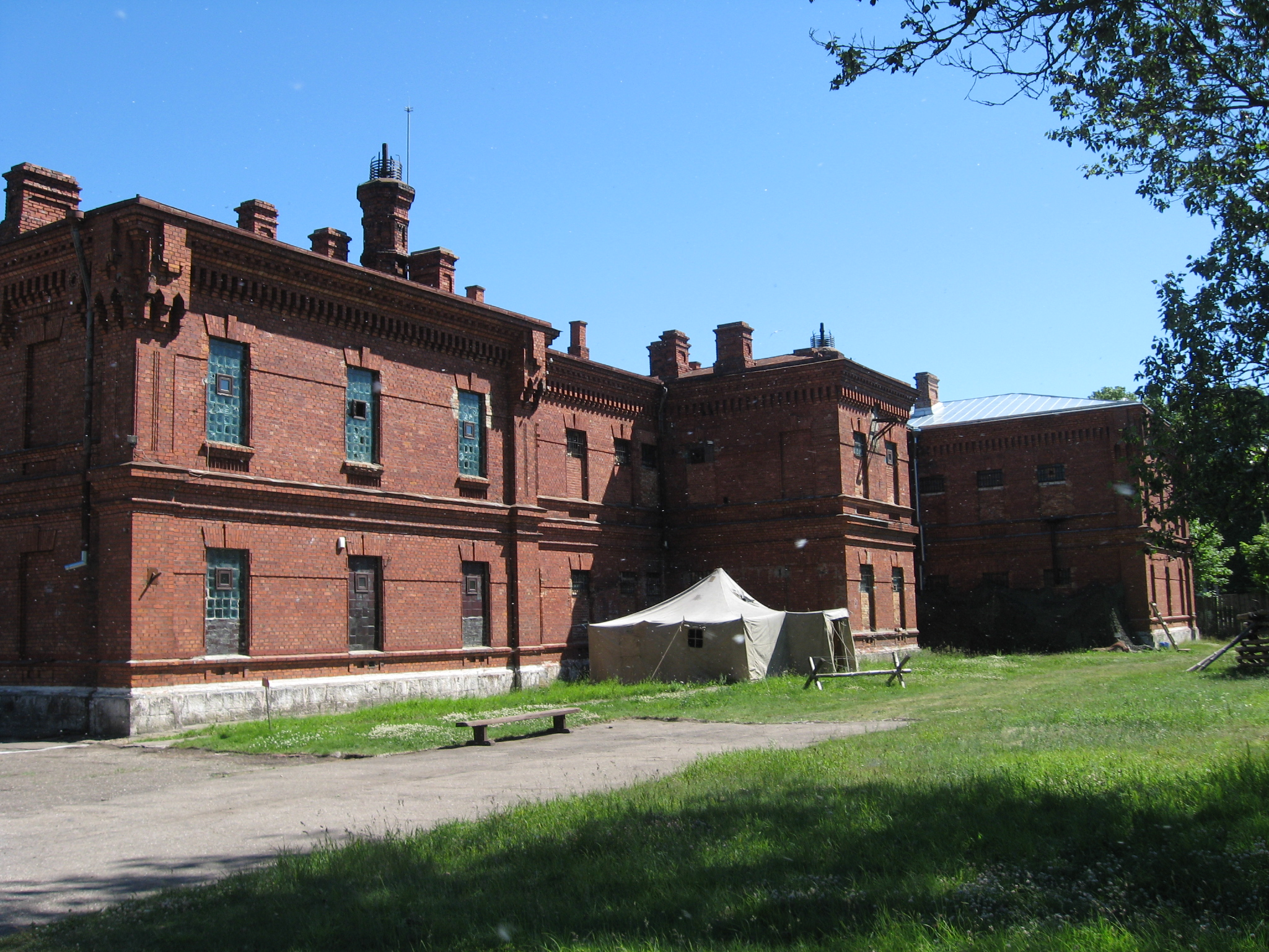 Liepājas karostas cietums, Liepāja, Invalīdu iela 4